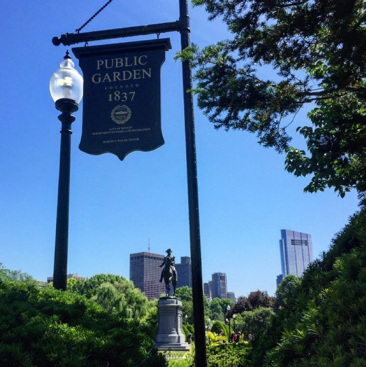 Lletreru Public Garden cola estatua de George Washington a lo lloñe.